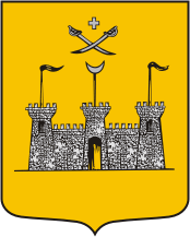 Герб Хотина 1826 року